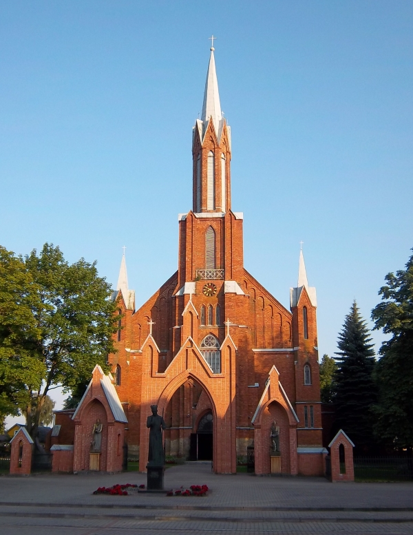 Kaišiadorių katedra